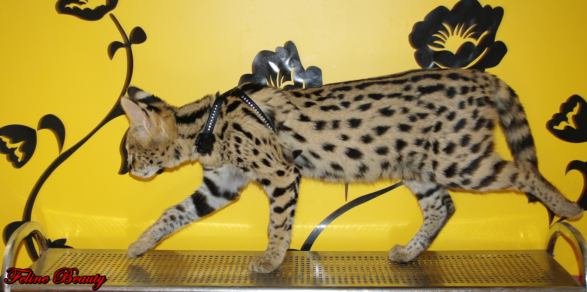 Serval socialisé de chez Feline Beauty sur